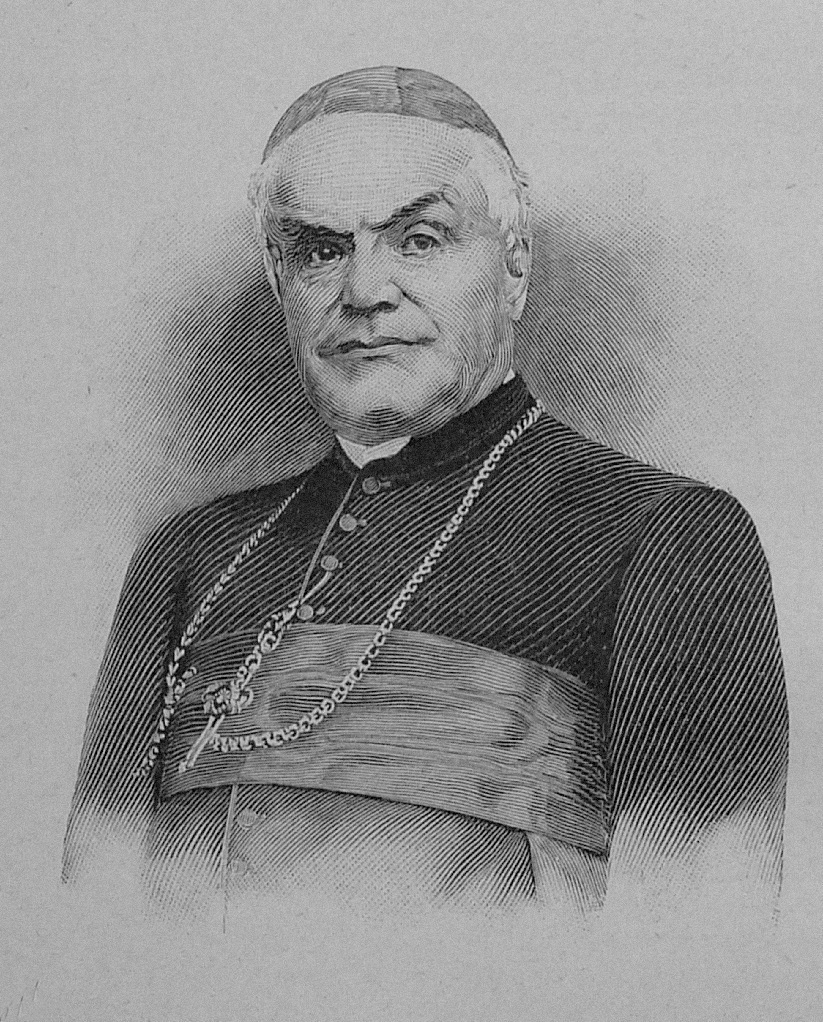 François-Désiré Mathieu, gravure d'après photo dans Figures contemporaines Album Mariani tome XI, 1908. Gravure non signée.